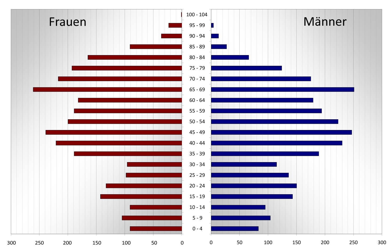 Bevölkerungspyramide für 2007 der Gemeinde Oderwitz in Sachsen